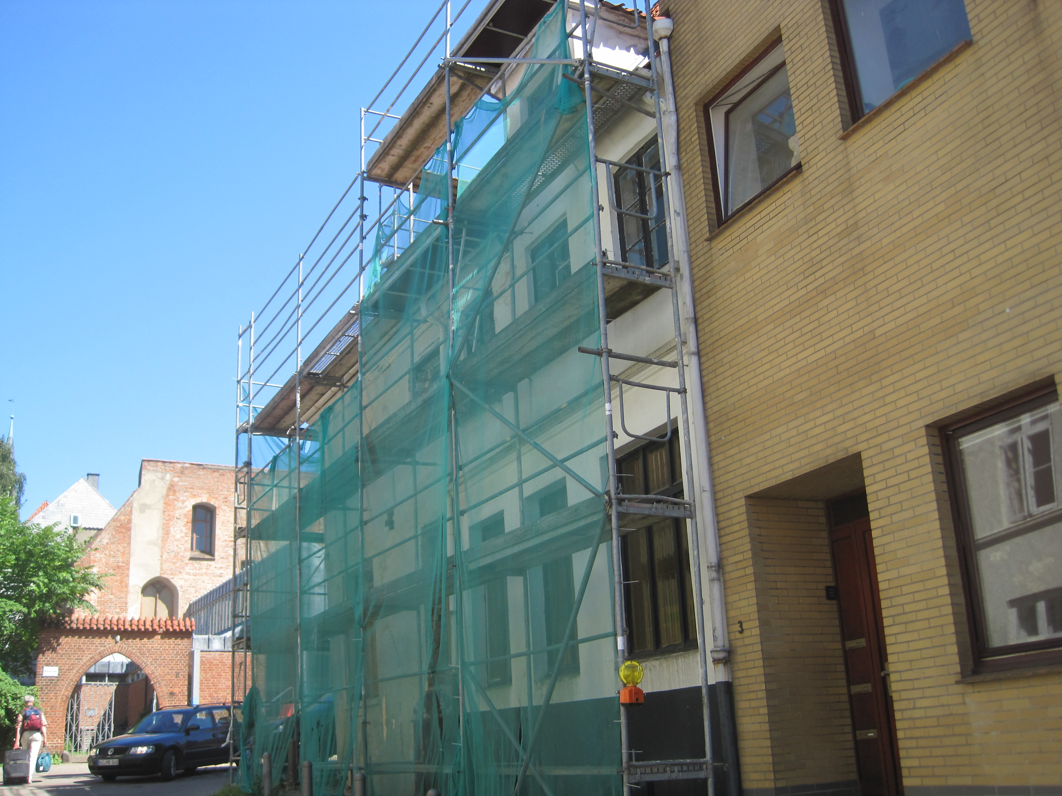 Hinter der Burg 15 / Kleine Burgstraße 1 in Lübeck (eingerüstet 2012)